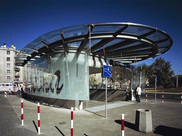 Stacja Metra A18 Plac Wilsona